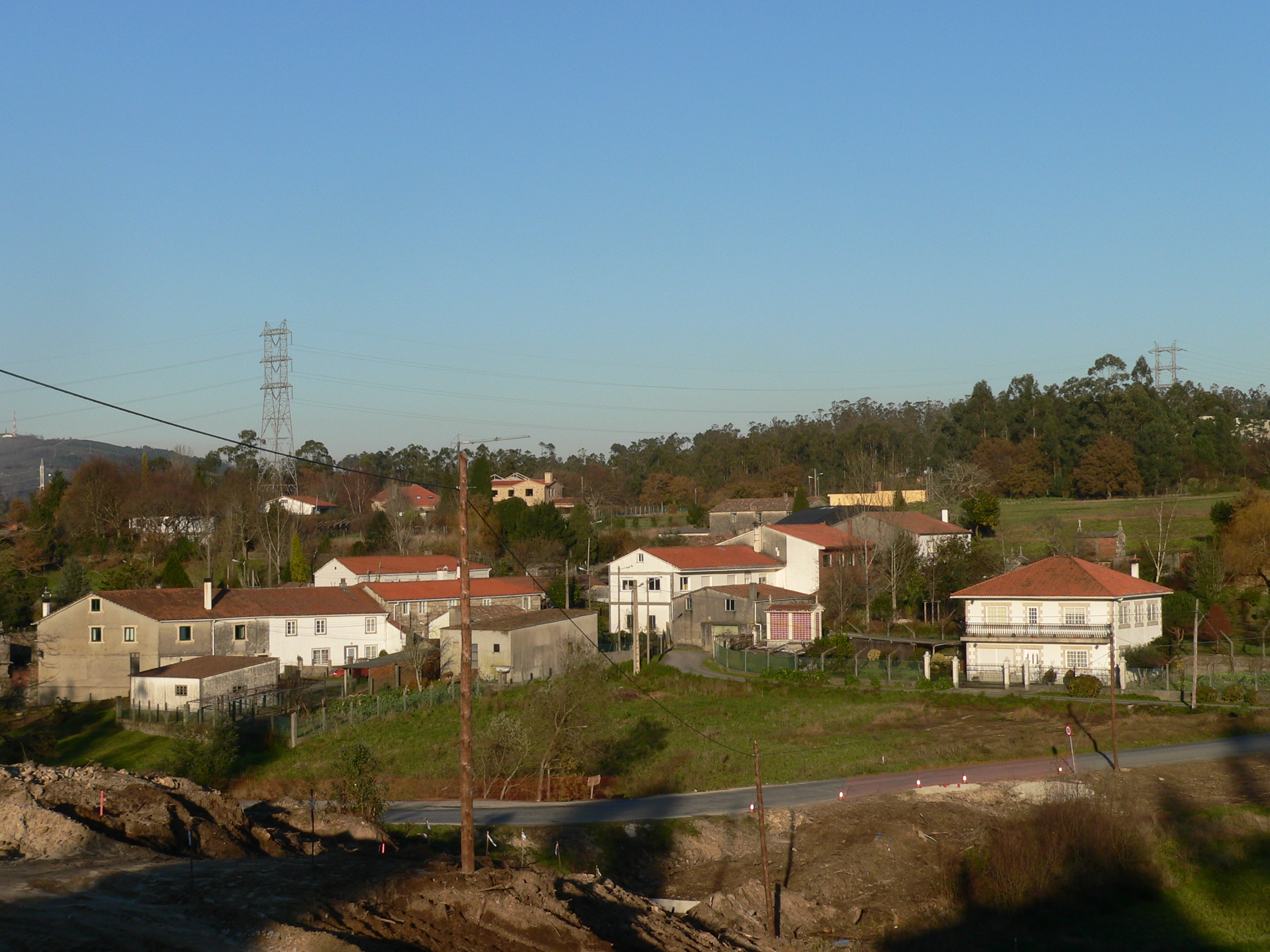 Paramuiño